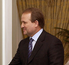 Ново-Огарево. Зустріч із головою адміністрації Президента України Віктором Медведчуком.